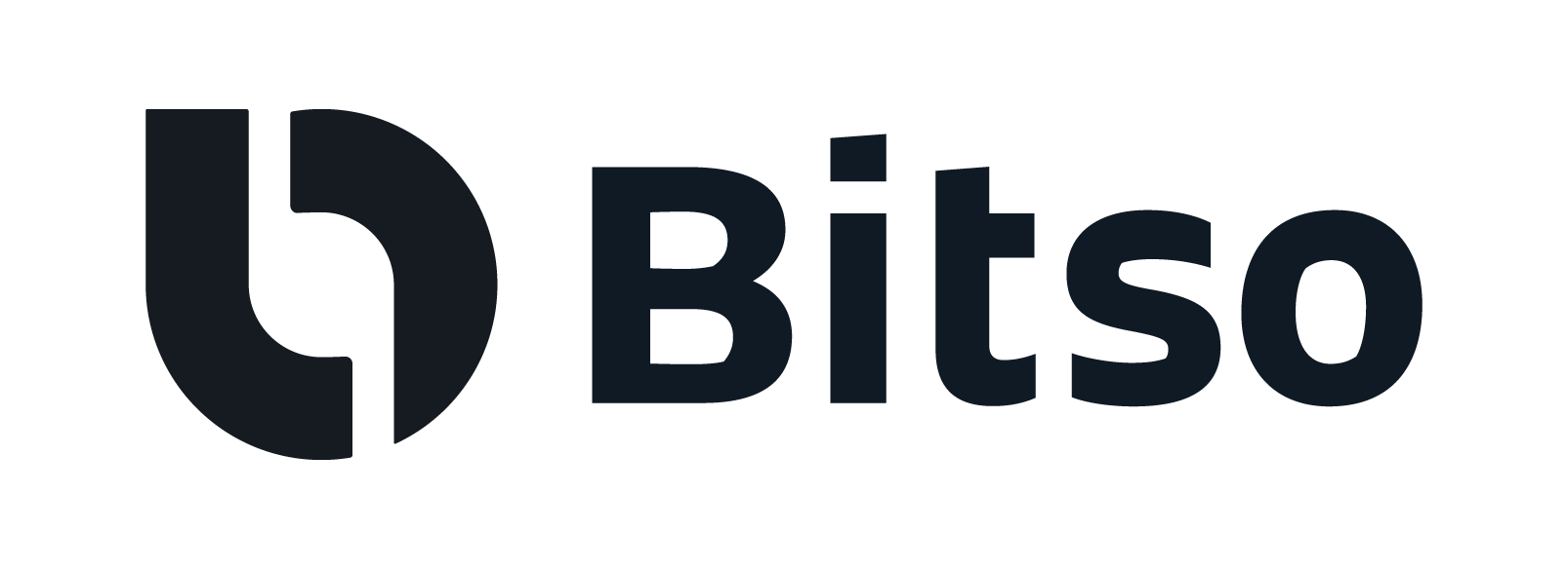 Logo de Bitso, empresa mexicana de criptomonedas